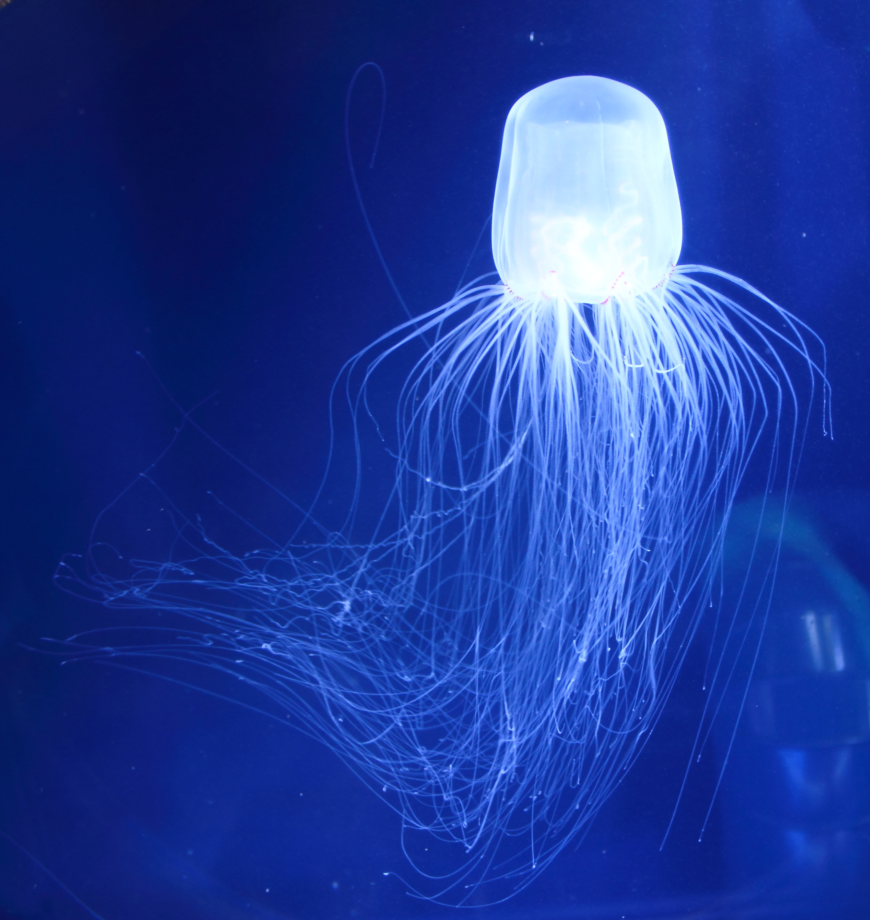 カミクラゲ（すみだ水族館）